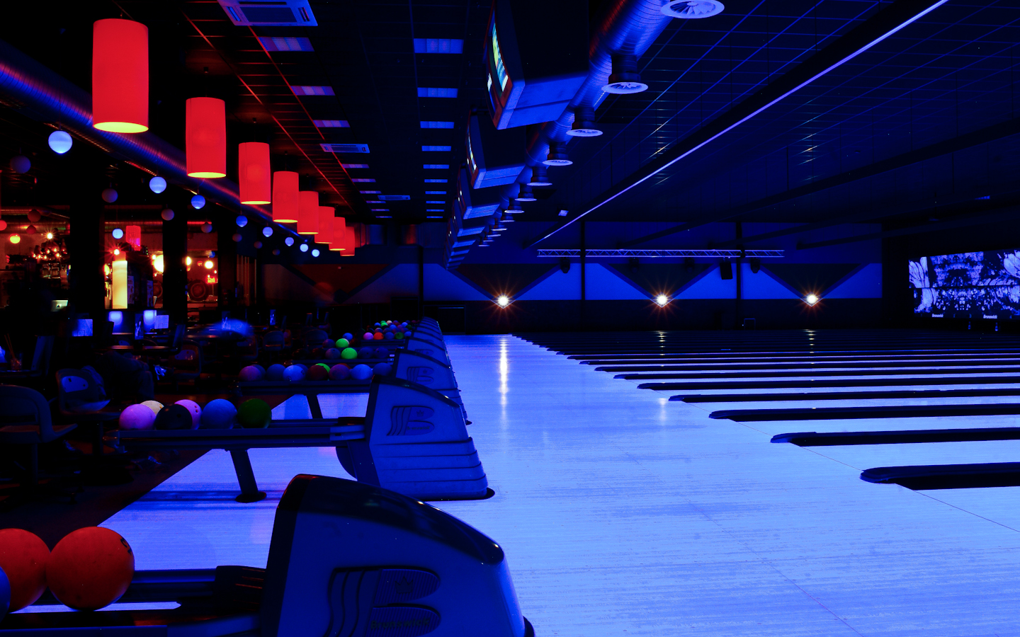 Moderne Bowlinganlage unter UV-Licht